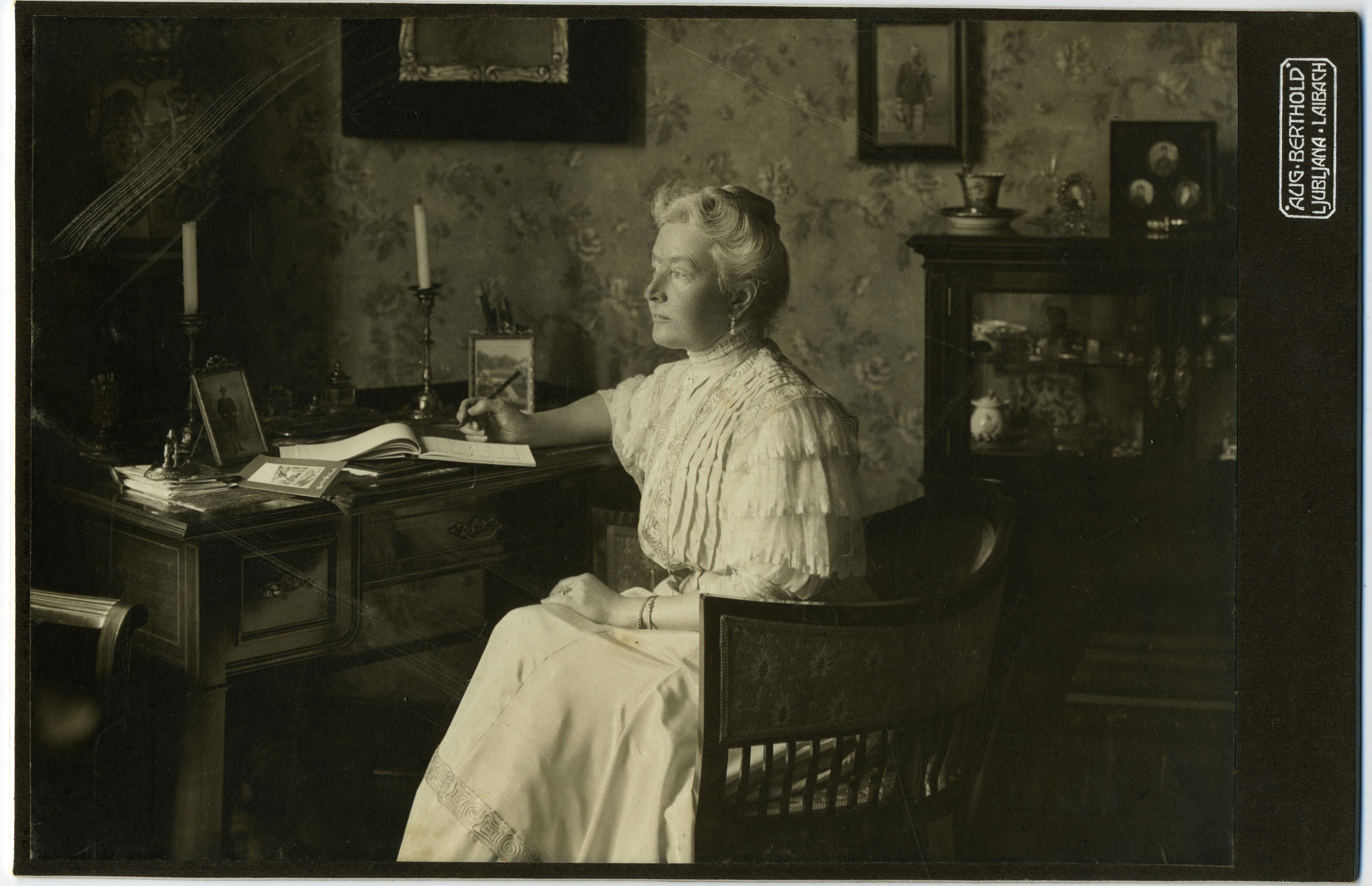 Ženski portret.